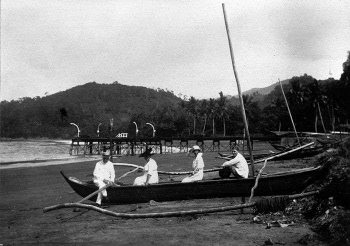 Foto. De Wijnkoopsbaai met prauw.